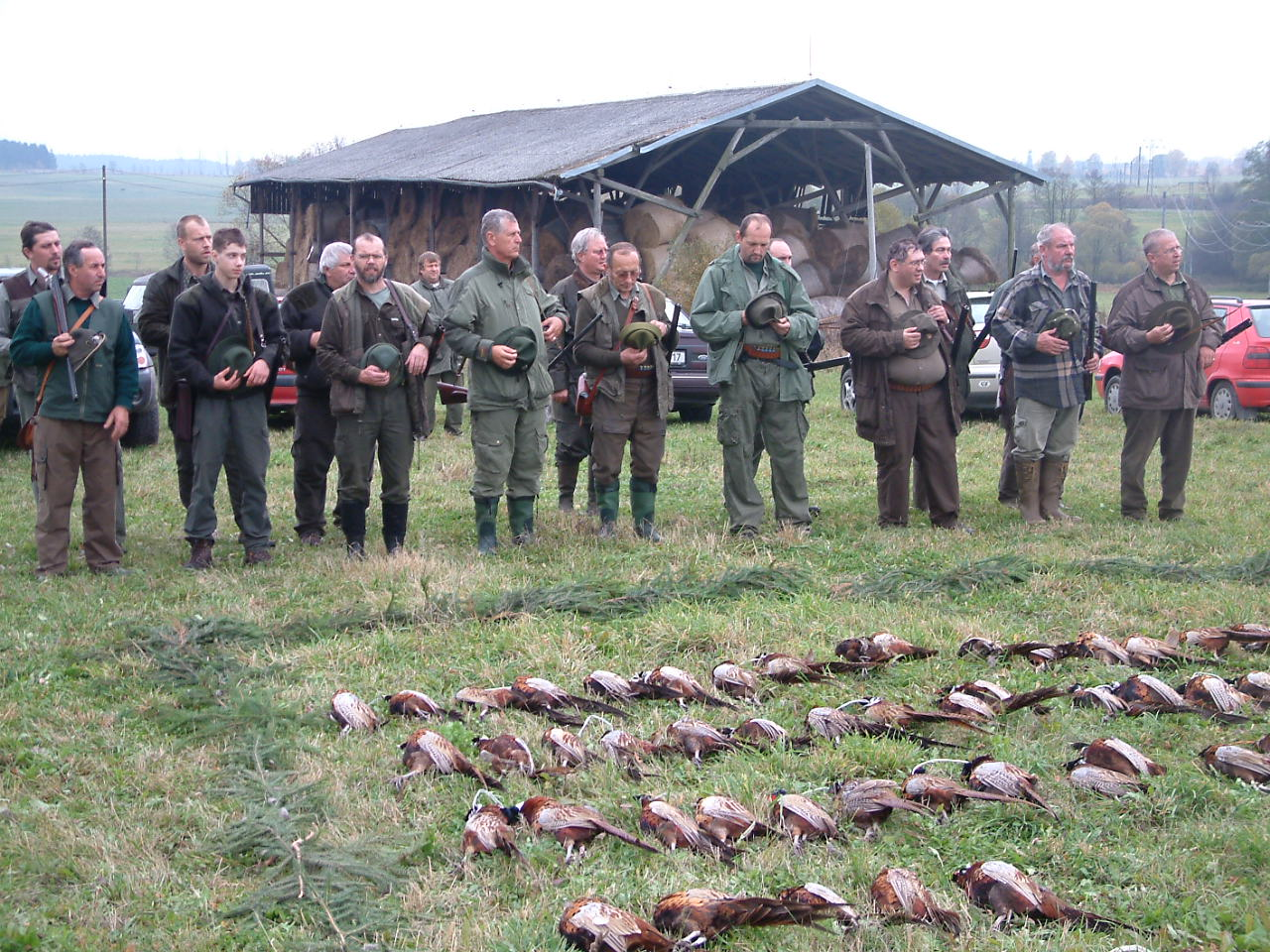 Bažantí hon (Fassanenjagd) 31.10.2006